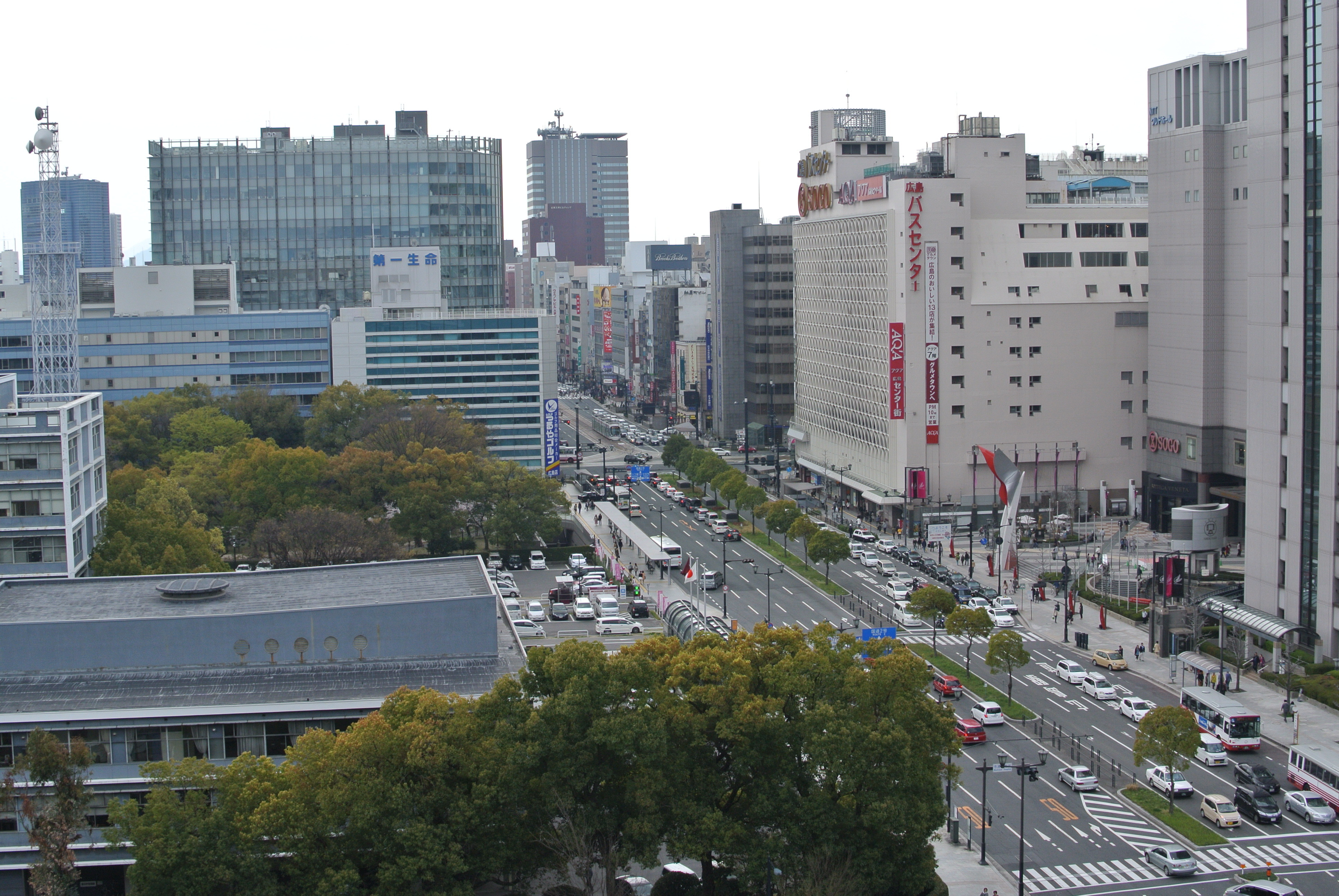 広島県広島市鯉城通りの北端付近。